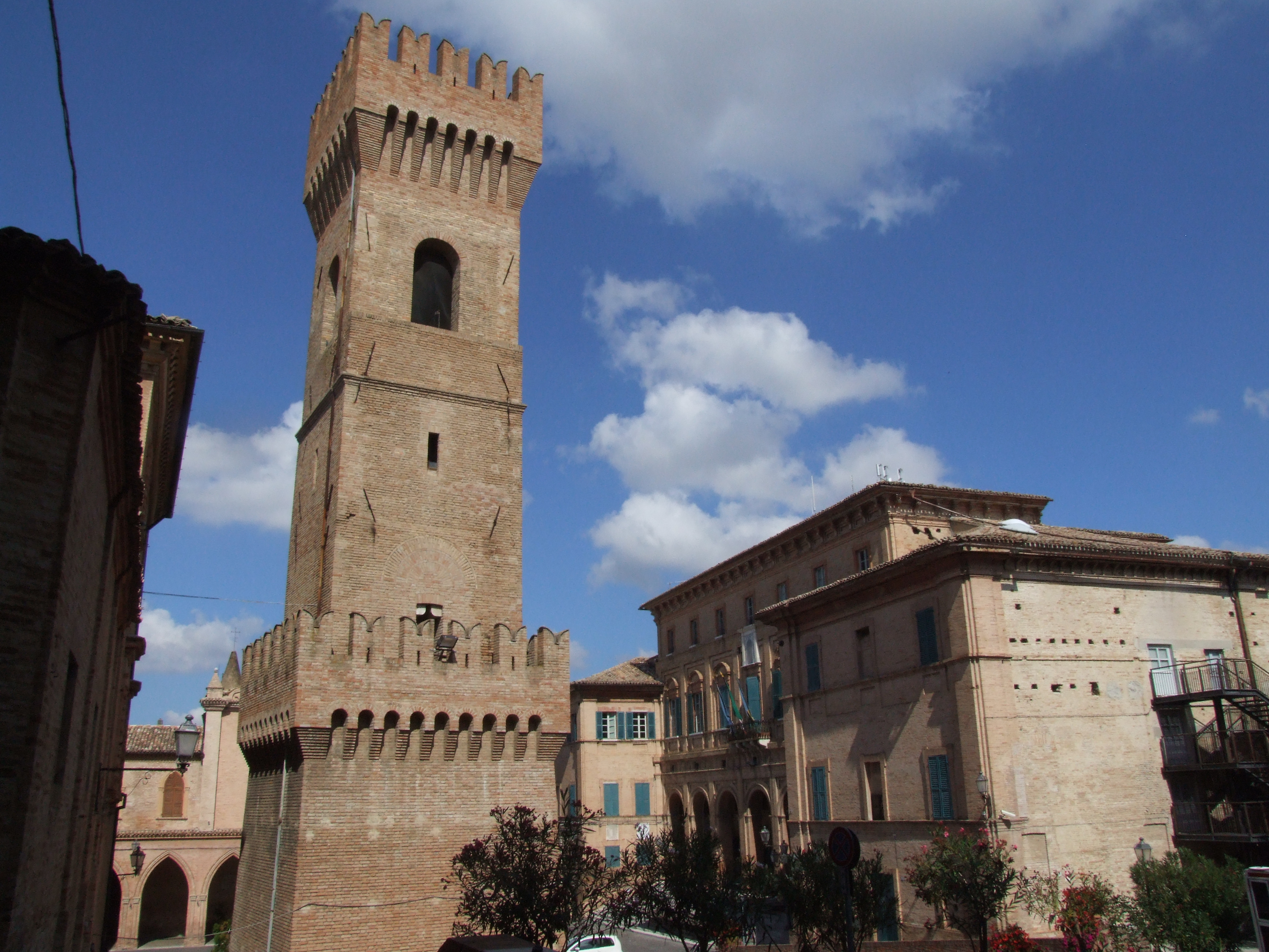 Torre Civica This is a photo of a monument which is part of cultural heritage of Italy.